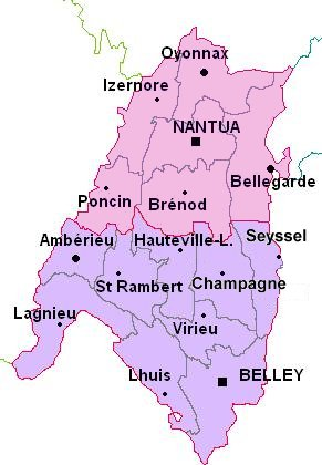 Carte administrative du Bugey (01)